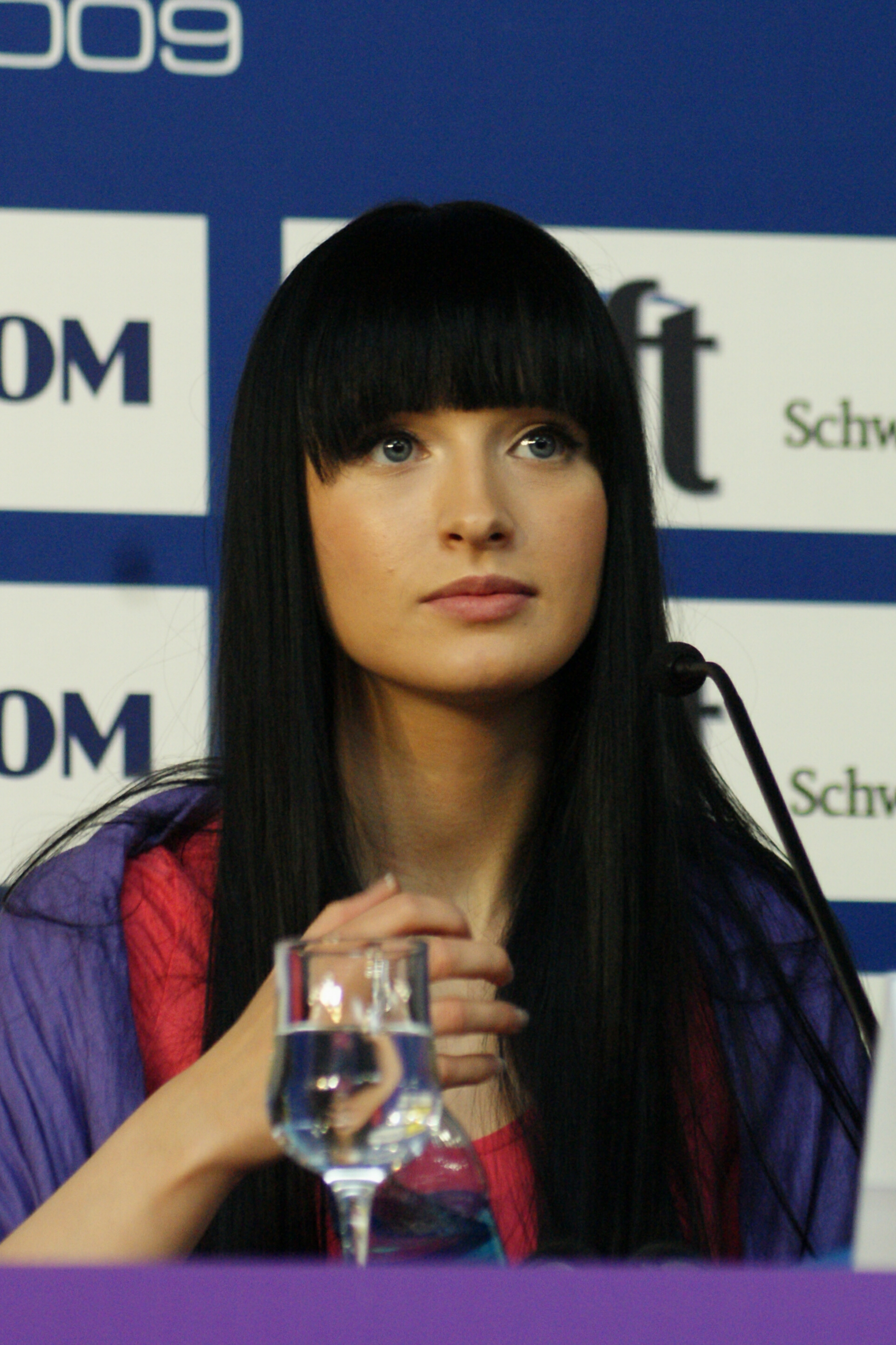 EStonian singer Sandra Nurmsalu.